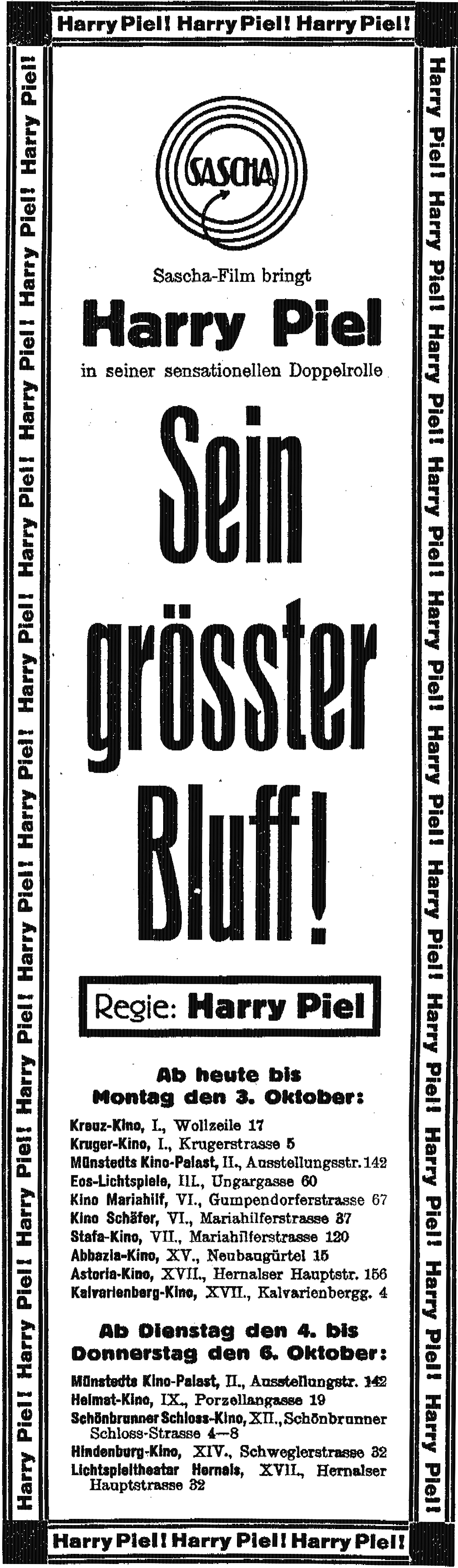 Werbeeinschaltung für den Kinostart von Sein größter Bluff in Wien